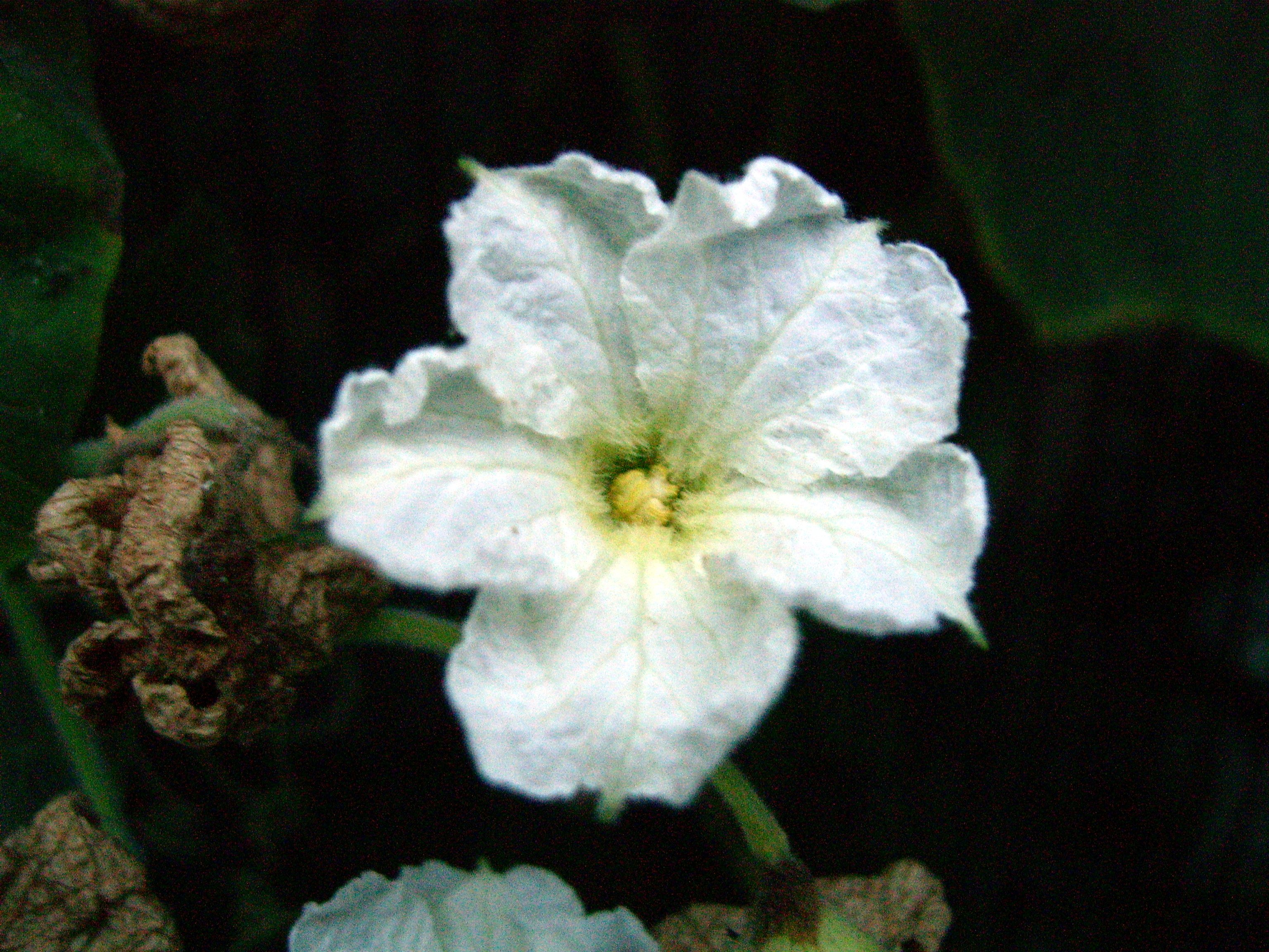 葫芦的花